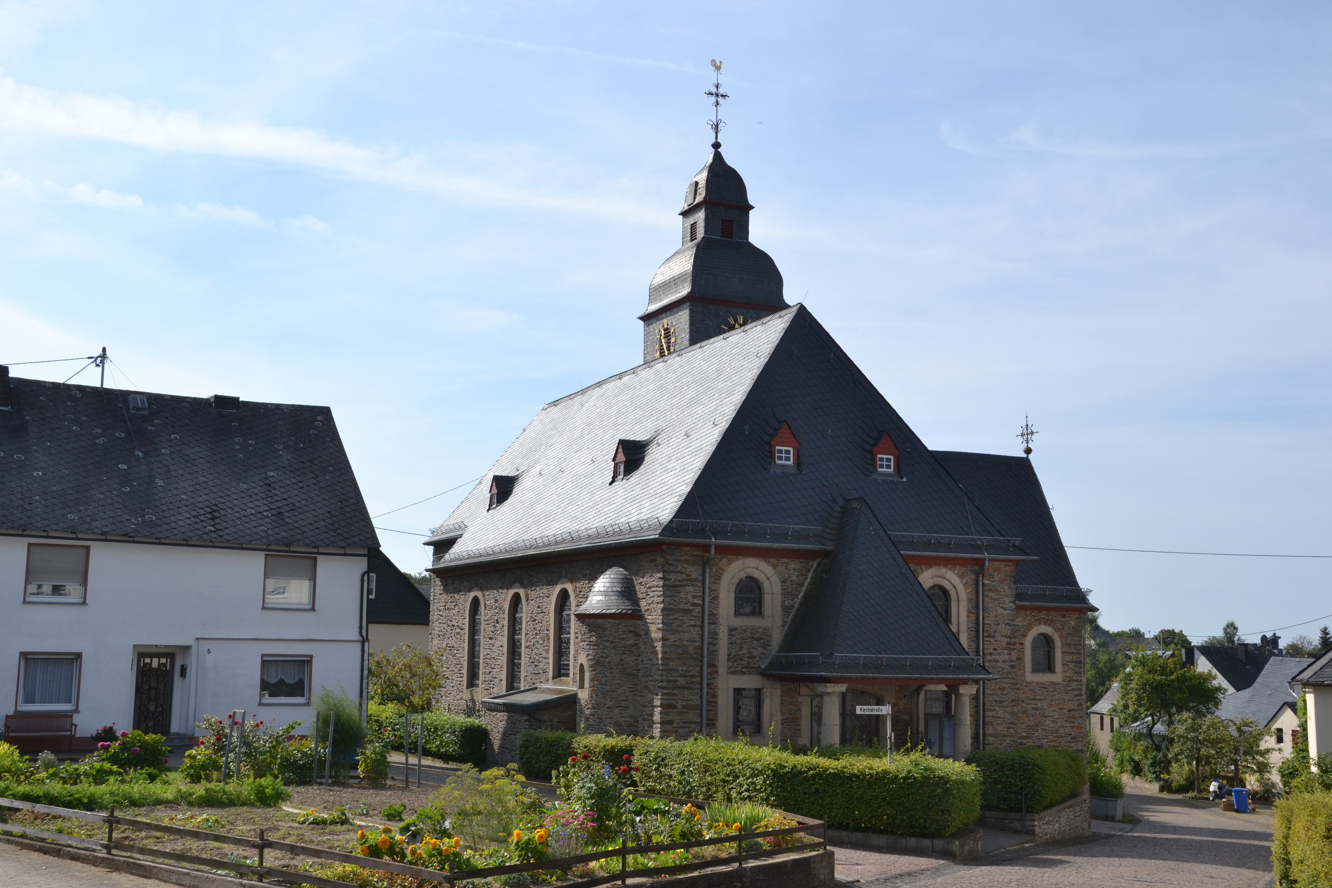 Dörth, Hauptstraße 7: Katholische Pfarrkirche St. Philippus und Jakobus